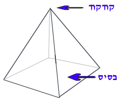 פירמידה ריבועית